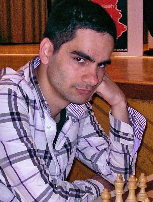 Twan Burg, 15. Internationales Neckar-Open (April 2011 in Deizisau).